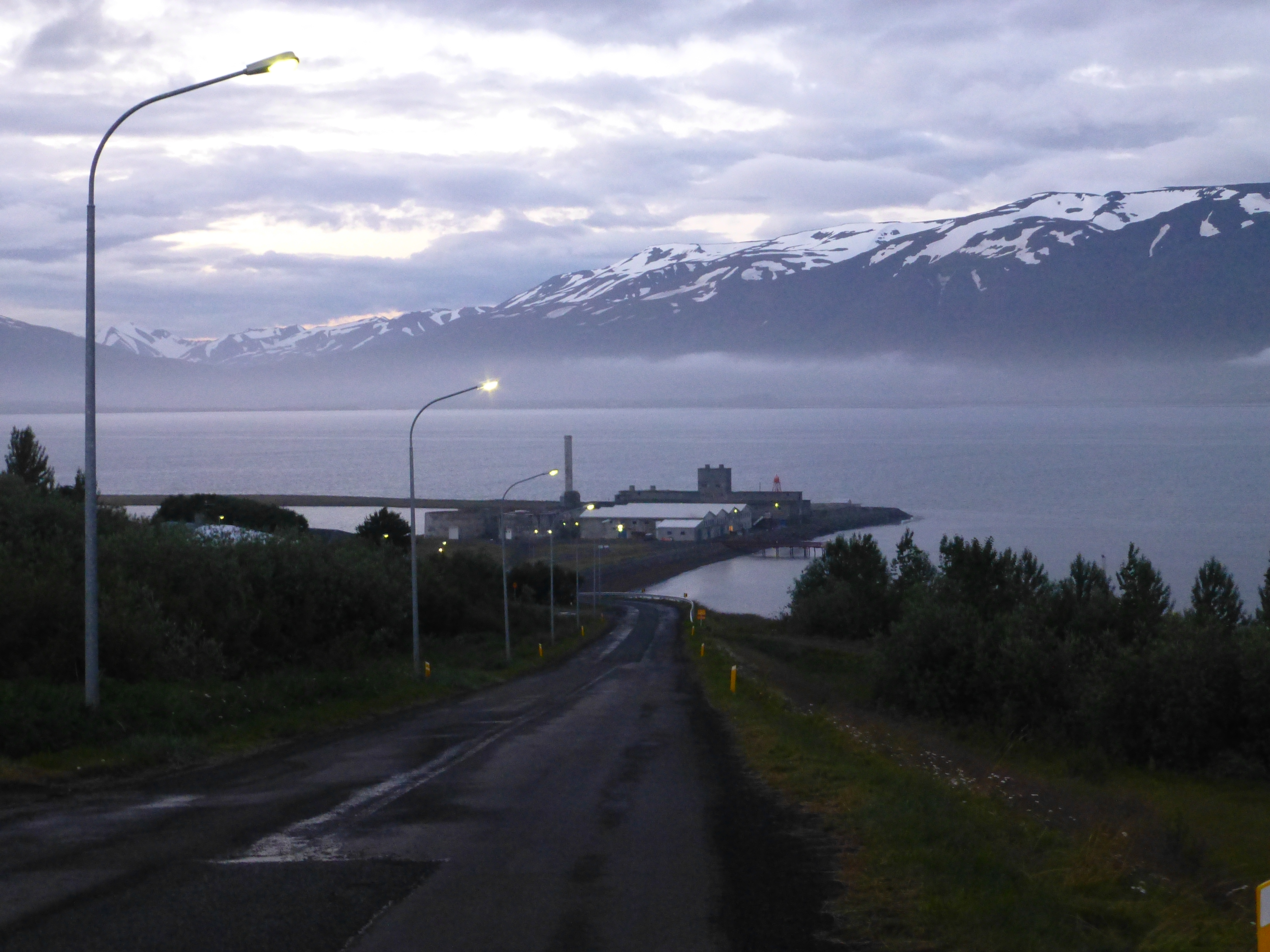 Hjalteyri, Blick auf die ehemalige Fischfabrik